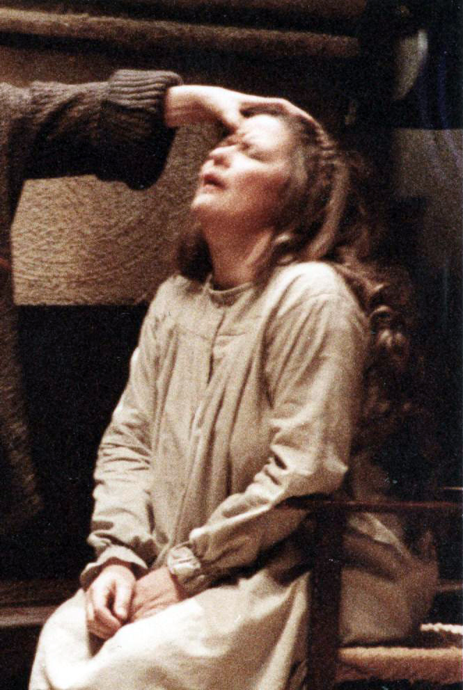 Jenufa